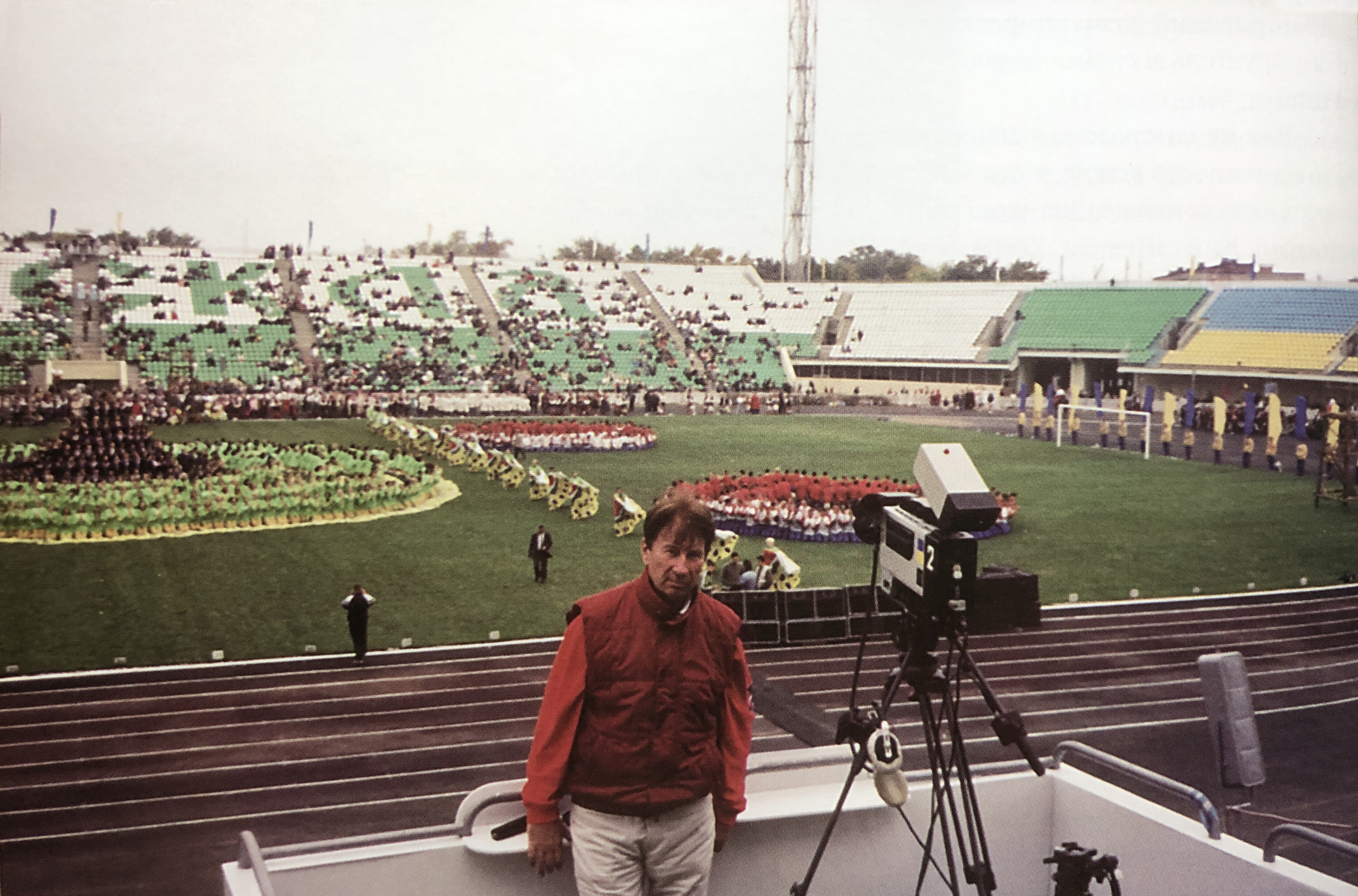 Підготовка свята "1100 років Полтаві", 1999 р. Репетиція свята на стадіоні "Ворскла"